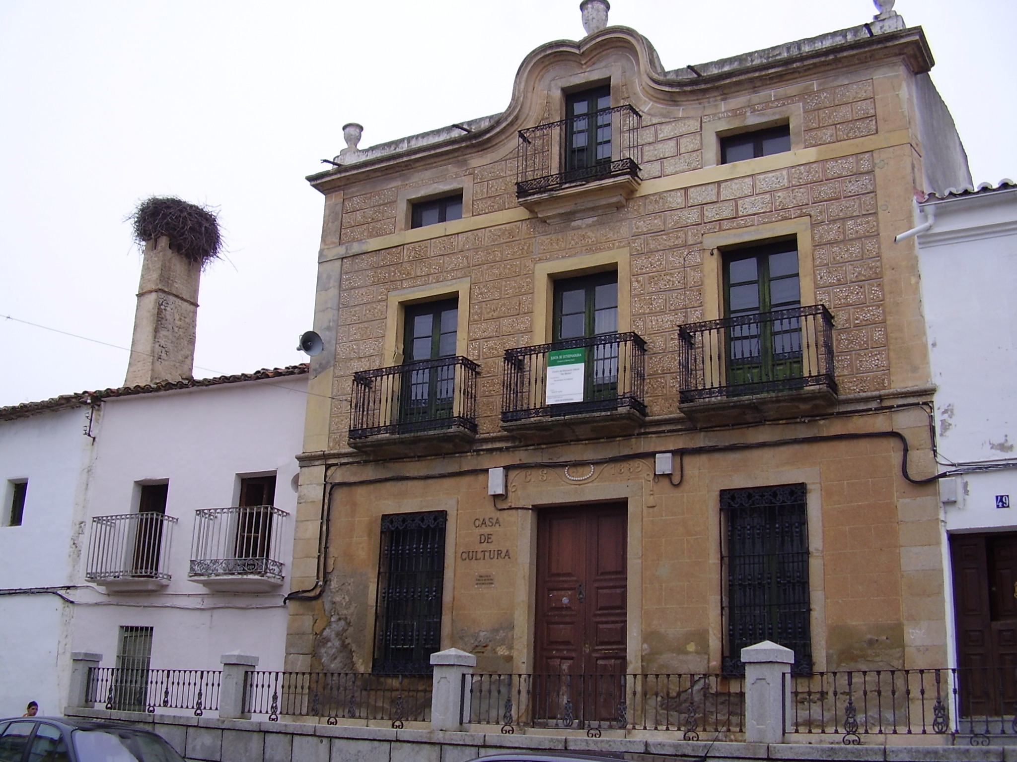 Casa de cultura en Cañaveral, provincia de Cáceres, España.